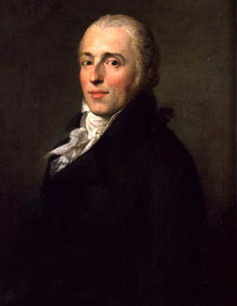 Johann August Otto Gehler als Stadtrichter von Leipzig, Porträt von Anton Graff, Öl auf Leinwand